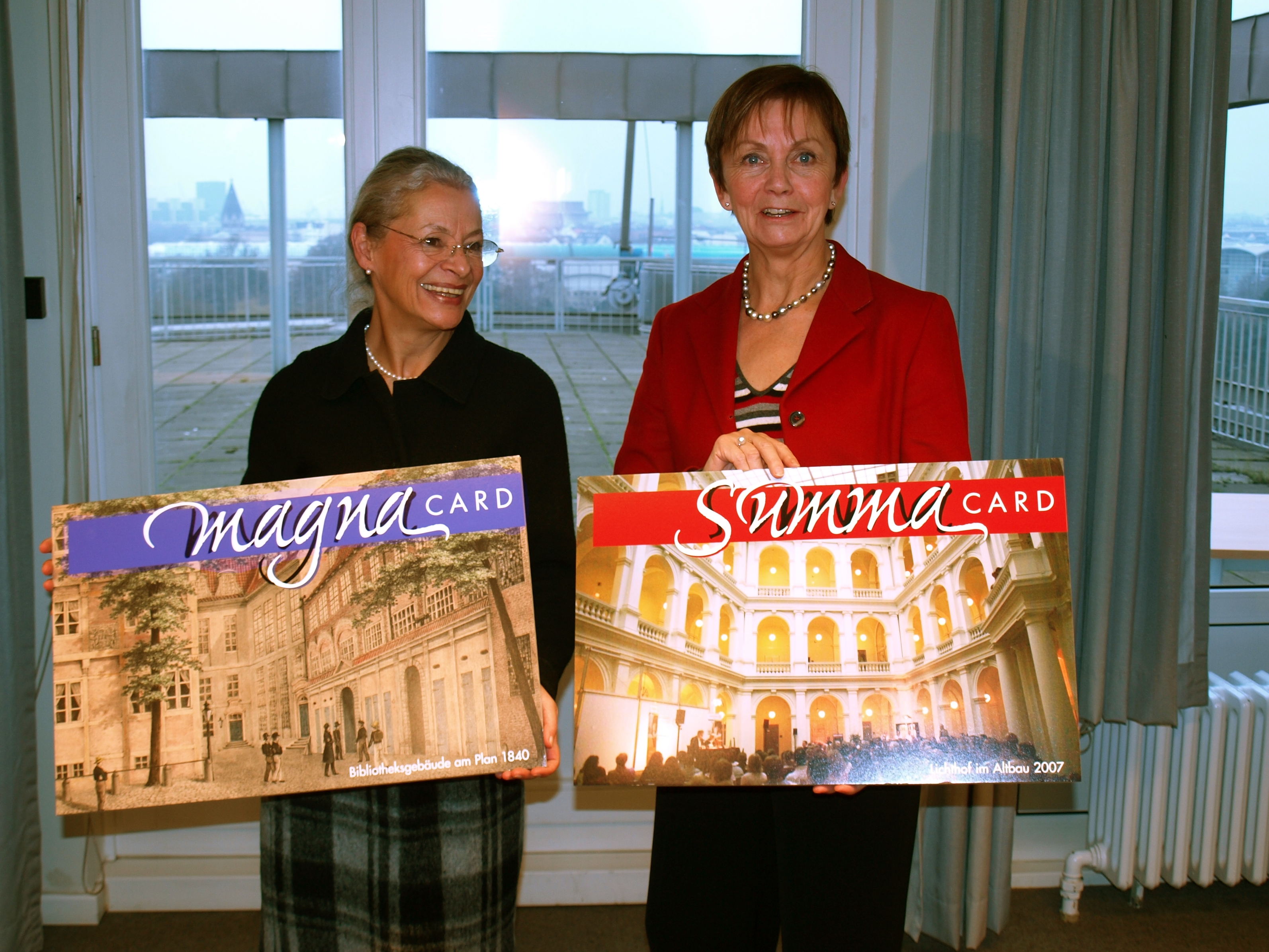 Direktorin der Staats- und Universitätsbibliothek Hamburg Prof. Dr. Gabriele Beger und Senatorin für Wissenschaft und Forschung Dr. Herlind Gundelach präsentieren Die "Magna-" und "Summacard" der Stabi zum 530 Jährigen Jubiläum.